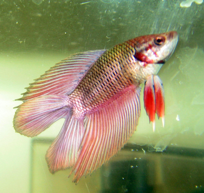 A male double-tail Betta (Betta splendens).